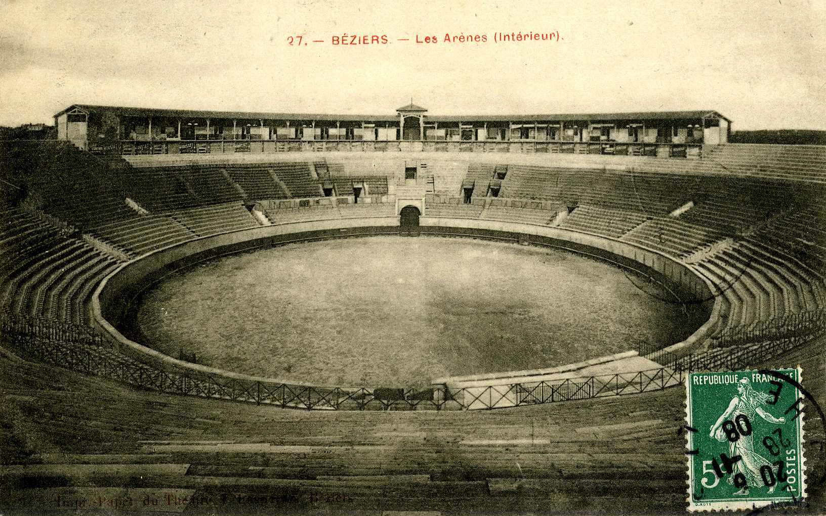 Carte postale des Arènes modernes de Béziers, au Pech de Valras, lieu des représentations du Théâtre des Arènes.